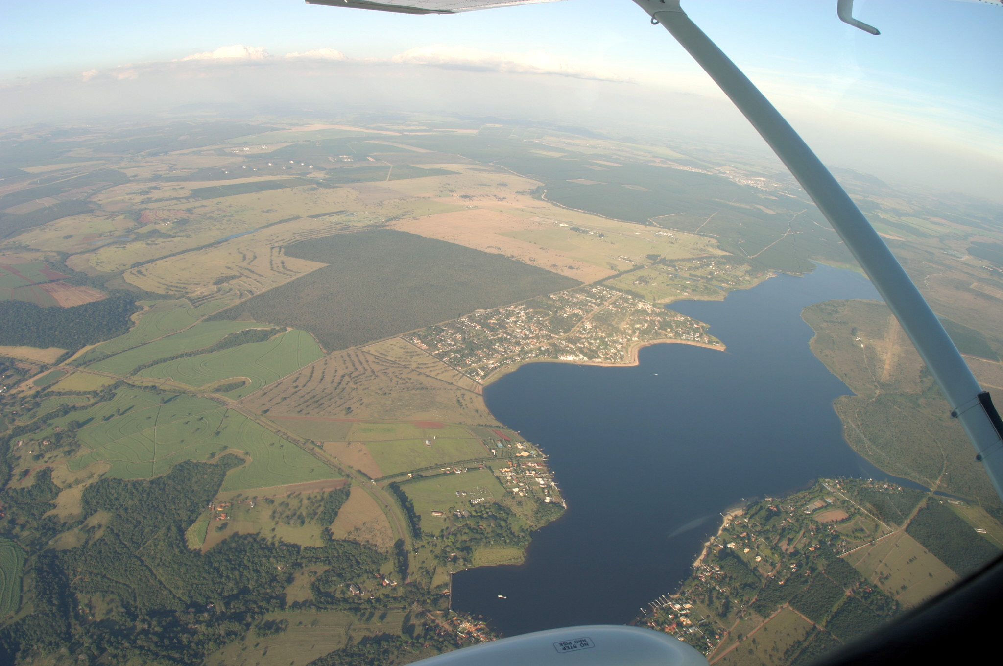 Foto aerea da Represa do Broa.